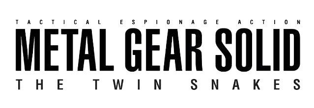 Logo de Metal Gear Twin snakes para gamecube.